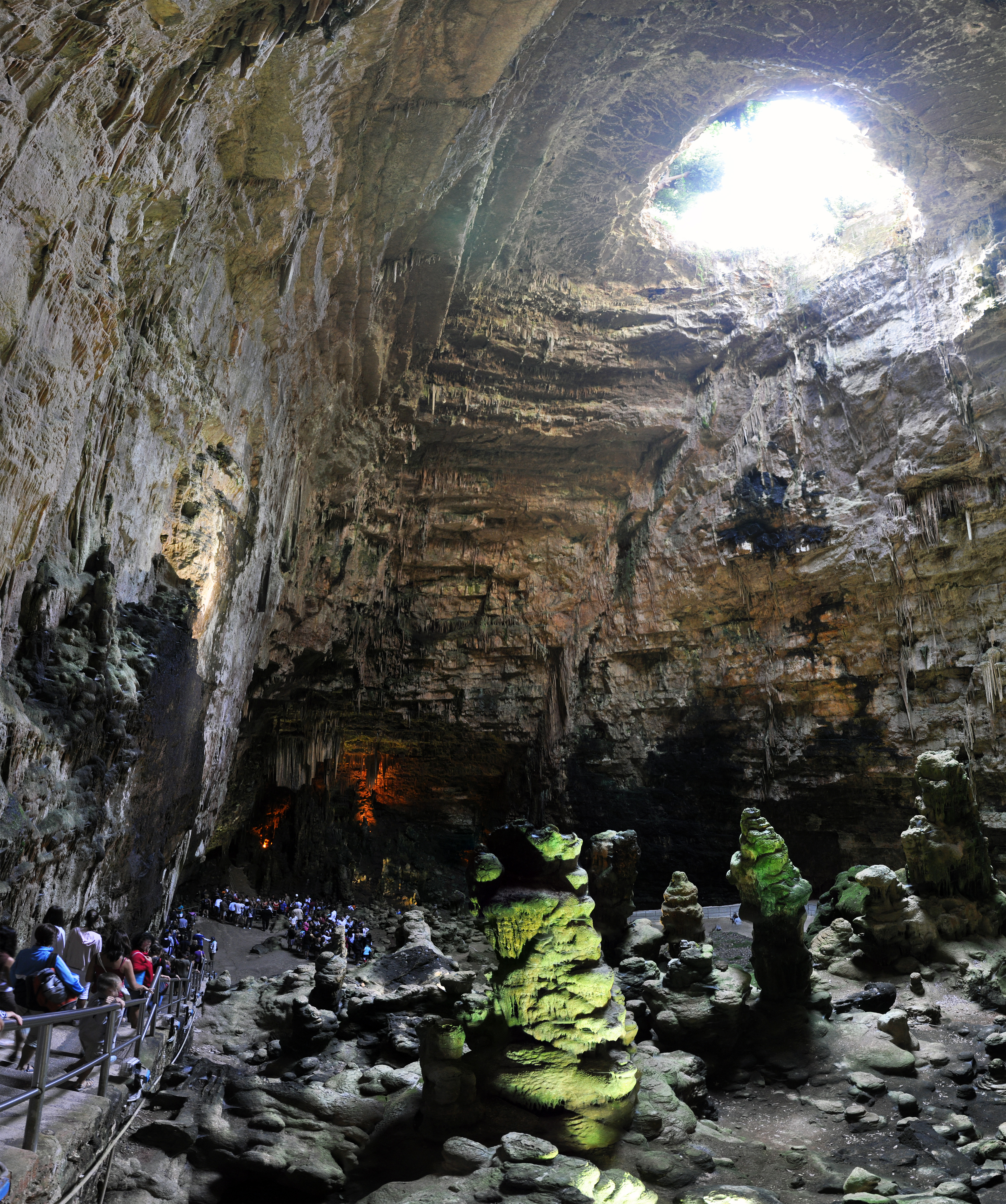 Panorama